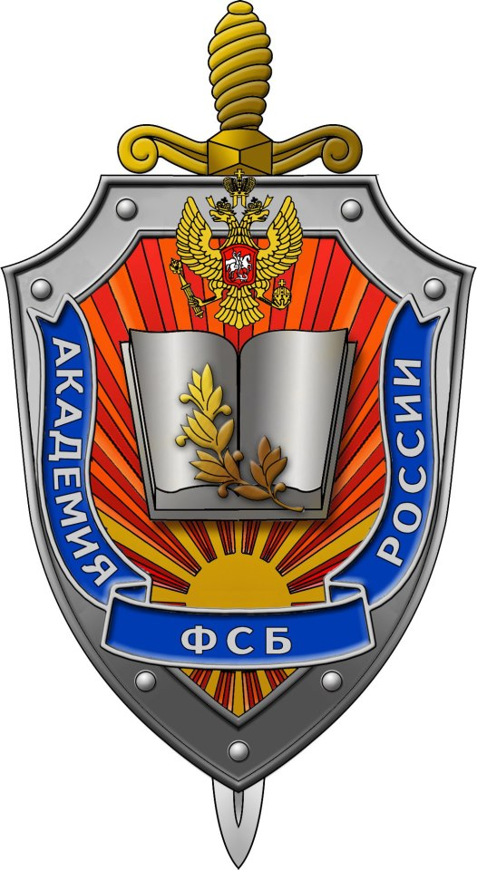 Emblemat Akademii FSB